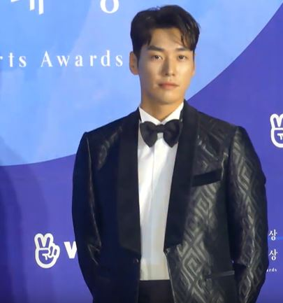 5월 1일 오후 서울시 강남구 삼성동 코엑스에서 제 55회 백상예술대상 시상식 레드카펫 행사가 열렸다.